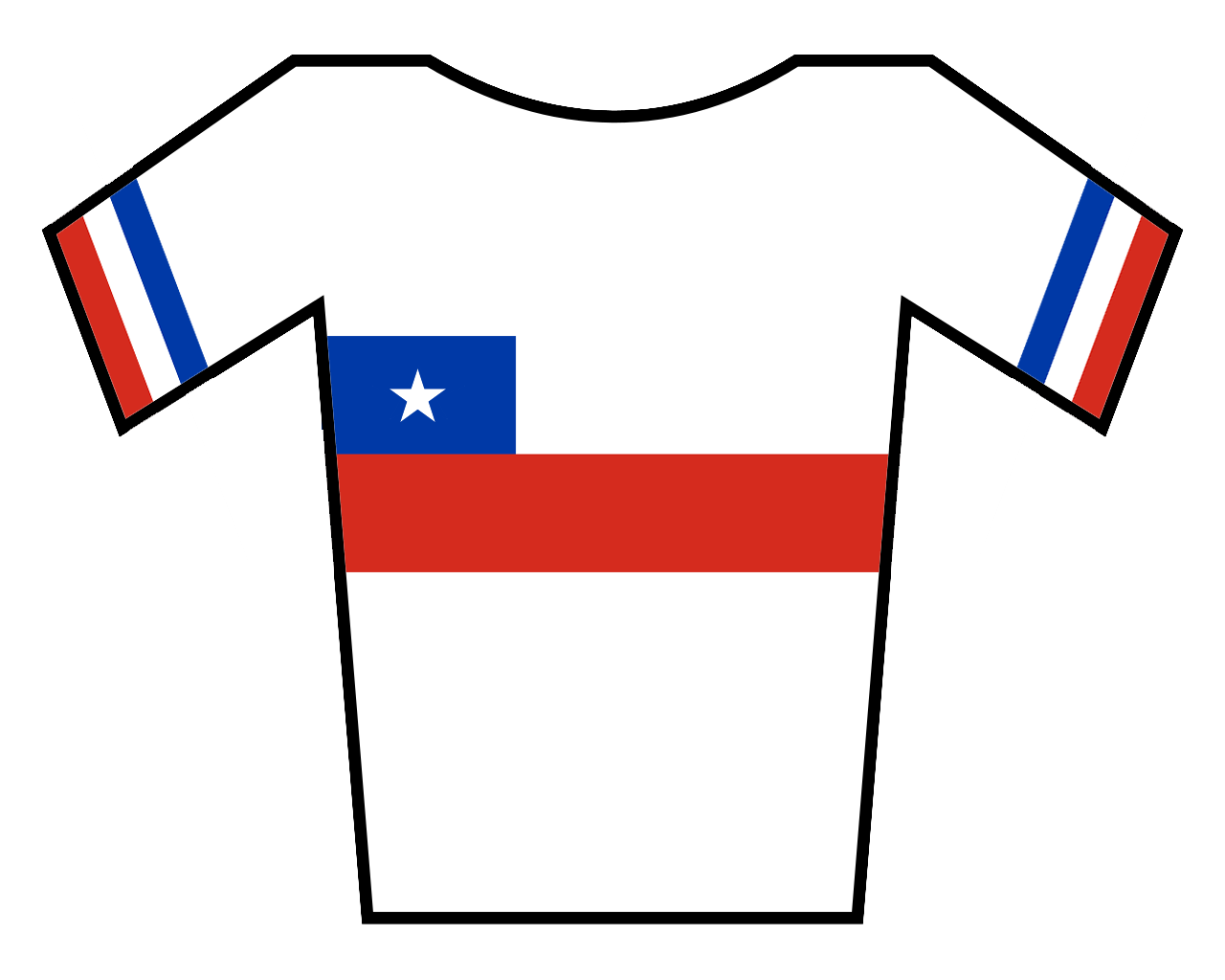 Maillot de Chile